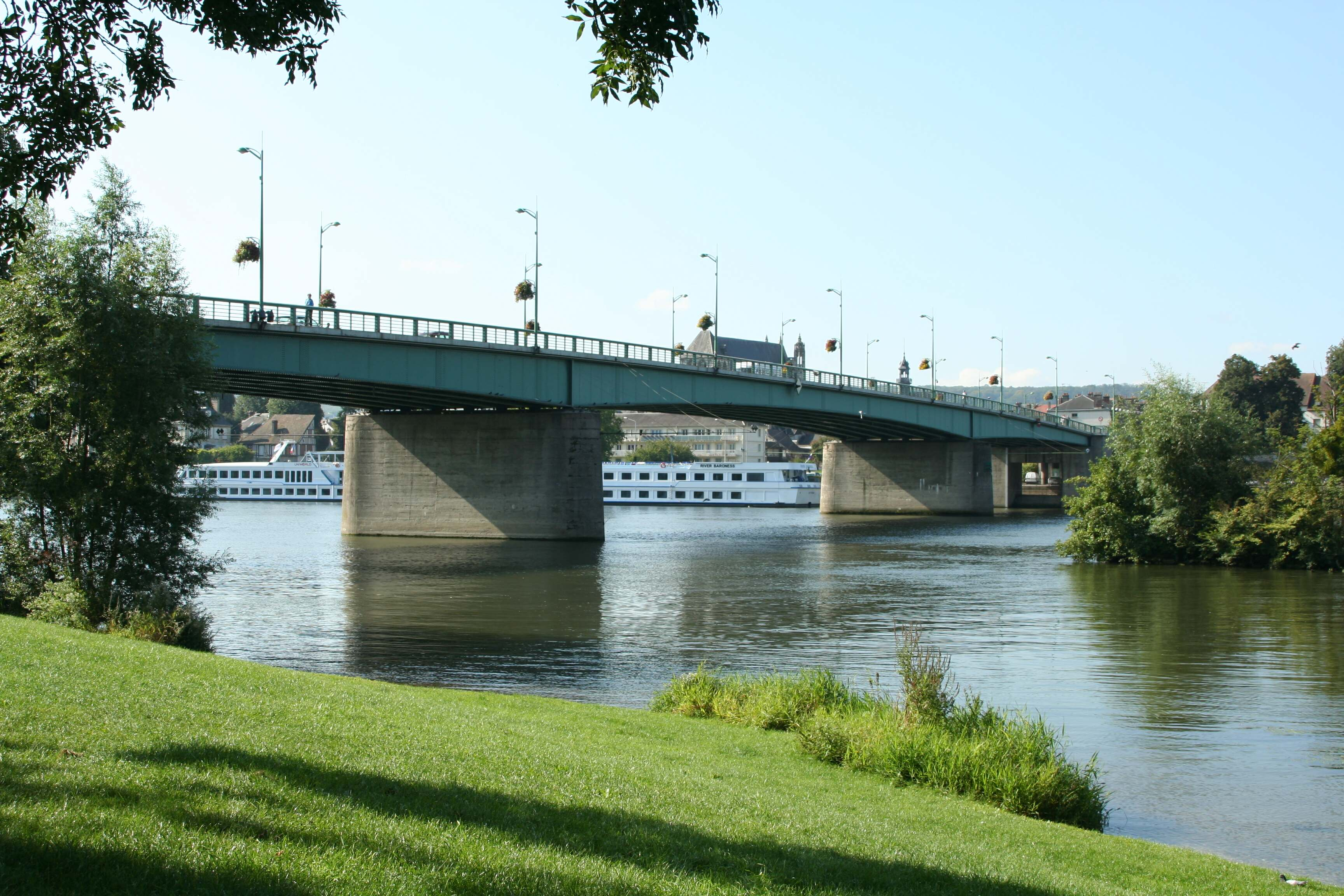 Le pont routier sur la Seine à Vernon - Eure (France) - Sur la droite, l'île du Talus.